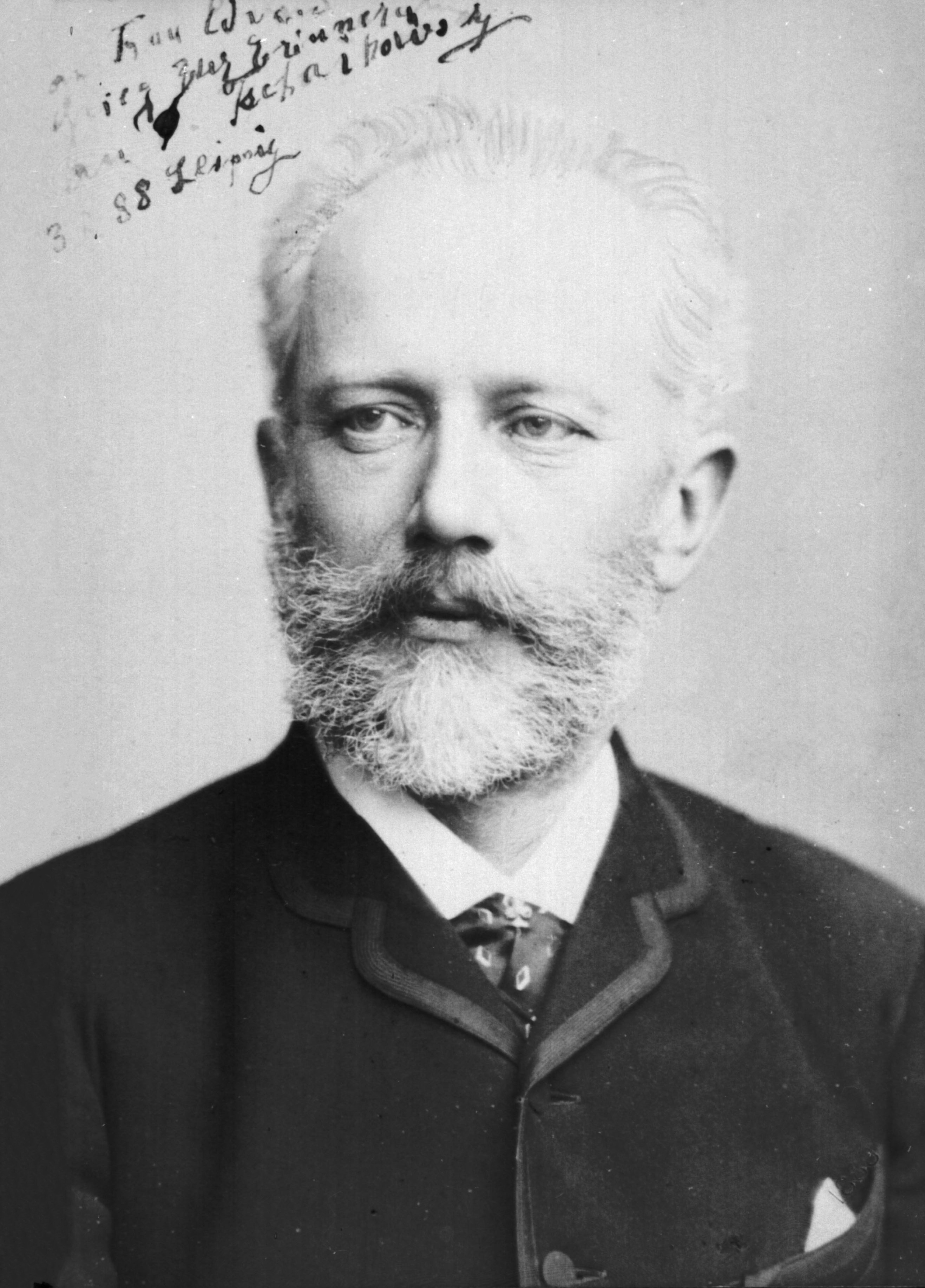 Portrait von Pjotr Iljitsch Tschaikowski, 1888, vermutlich von Leonard Berlin im Atelier E. Bieber Hamburg